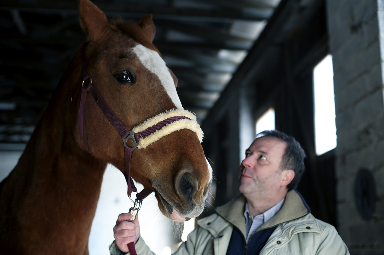 Szene aus einem Workshop mit dem Co-Trainer Pferd